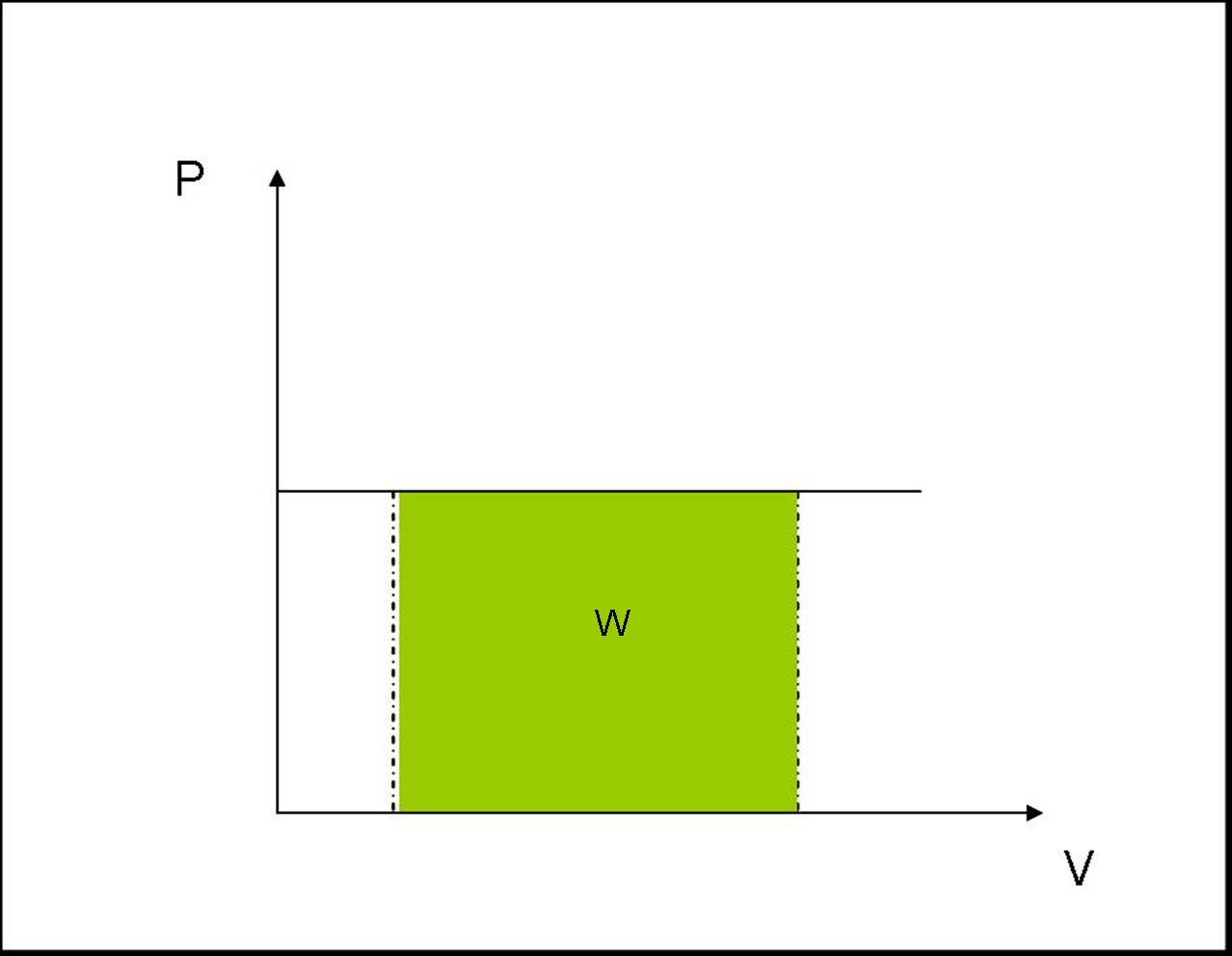 proceso isobarico, Presion volumen trabajo